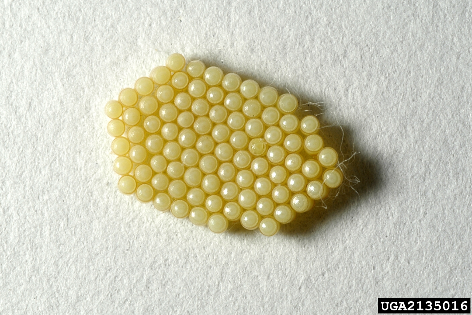 Nezara viridula (eggs) ; family Pentatomidae